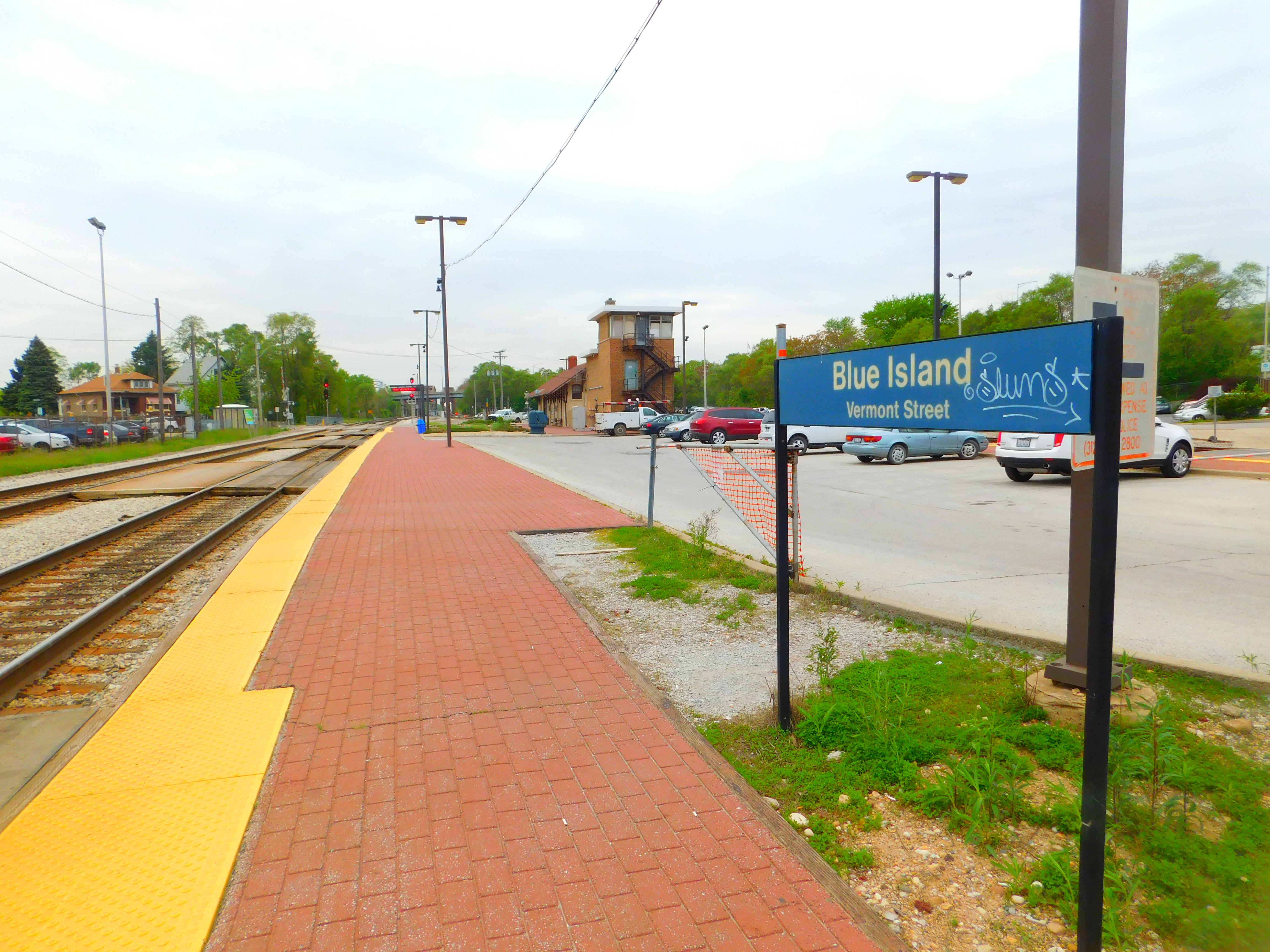 Blue Island, Illinois